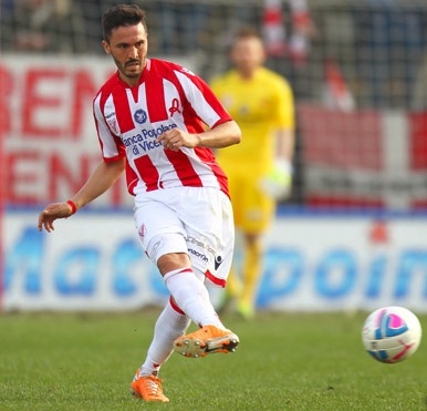 Abderazzak Jadid durante Vicenza-FeralpiSalò, Lega Pro Prima Divisione 2013-2014